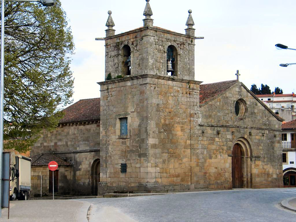 Igreja matriz de Armamar, Portugal (Século XIII)/Church of Armamar, Portugal (13th century)